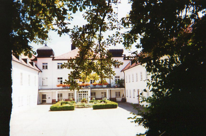 Schloss Amstorf von Westen